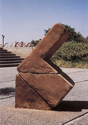 Sculpture